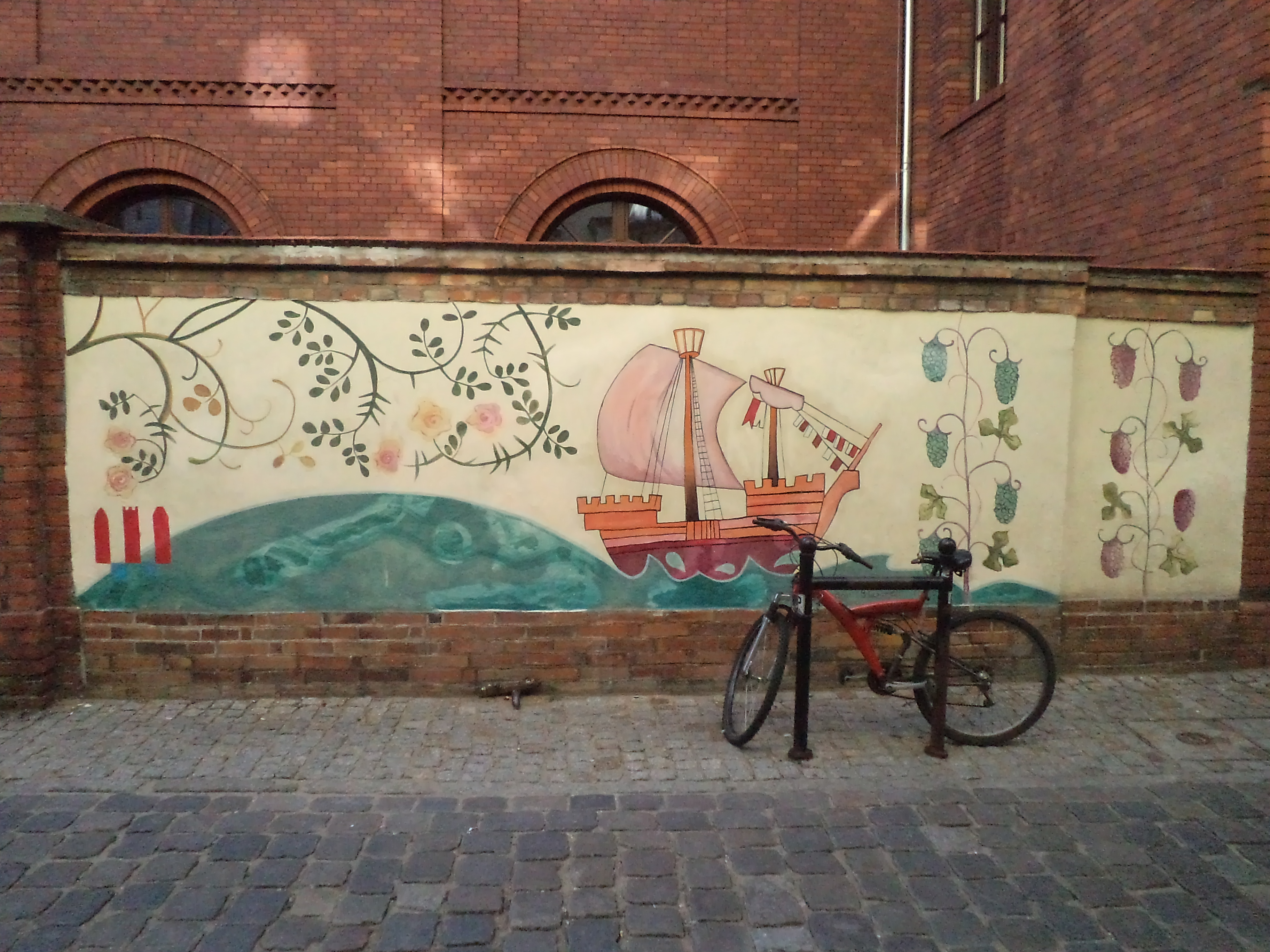 Toruń, dom Bractwa Strzeleckiego, ob. Młodzieżowy Dom Kultury, 1892-1893